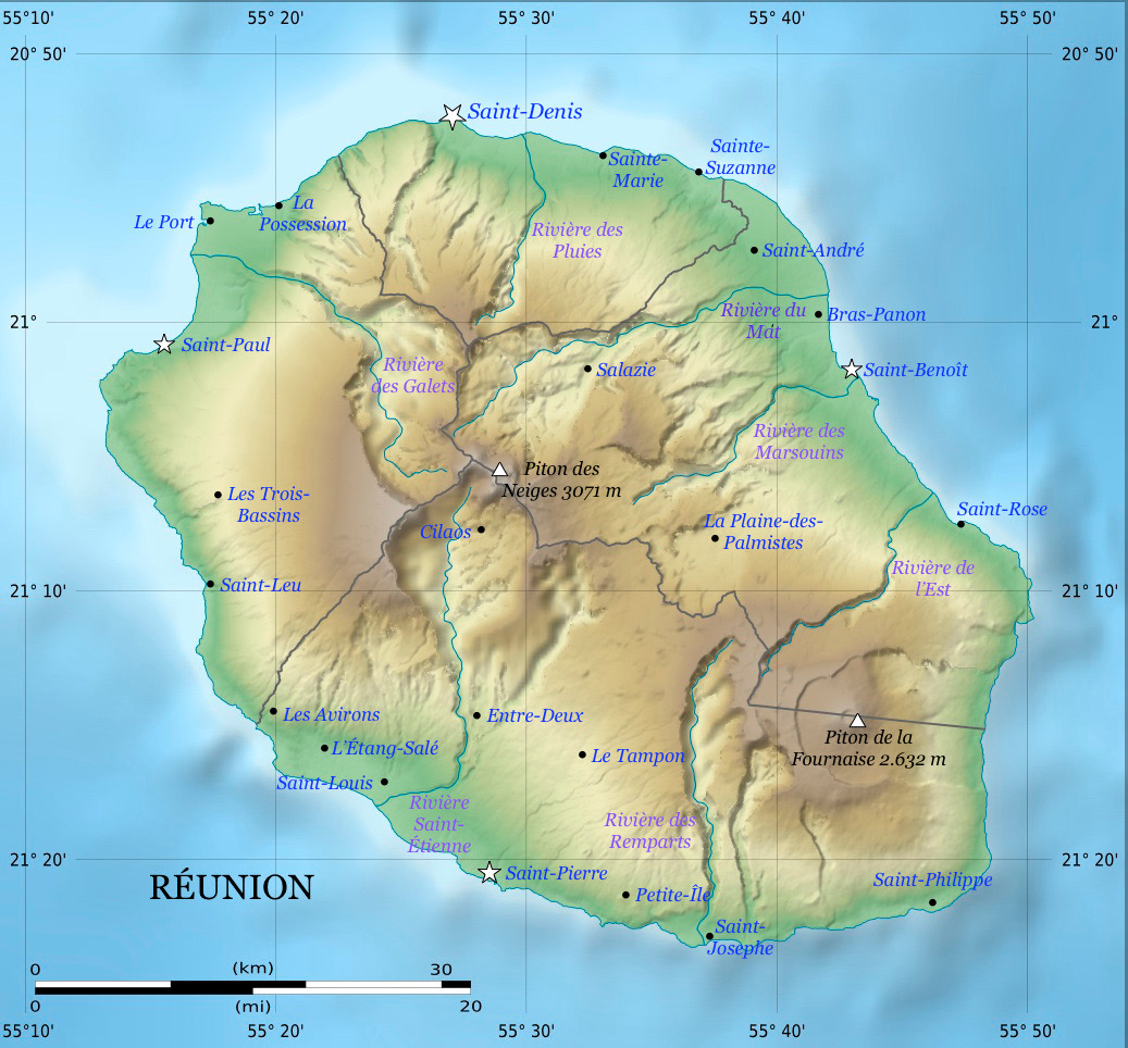 Mapa de la isla Reunión